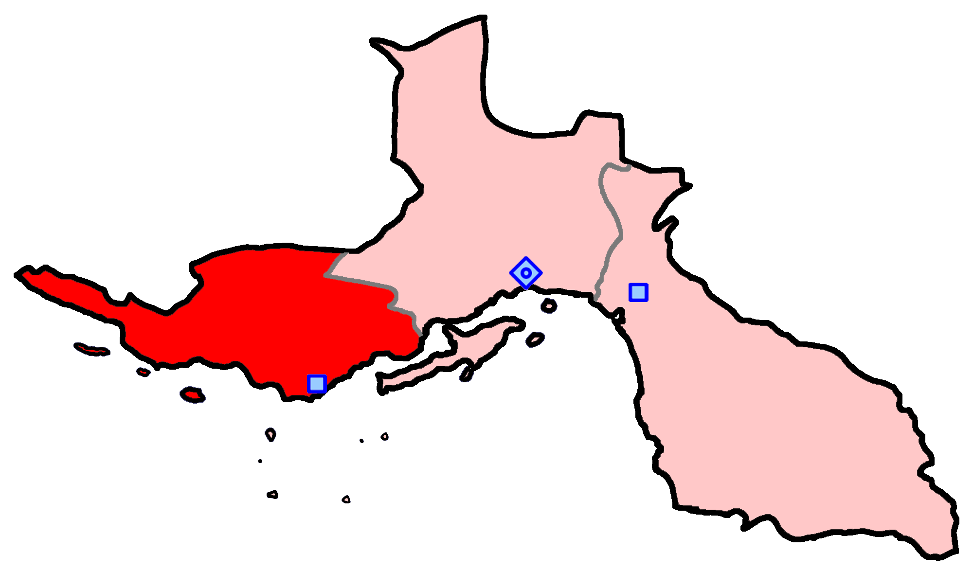 حوزهٔ انتخاباتی بندرلنگه و بستک و پارسیان برای انتخابات مجلس شورای اسلامی